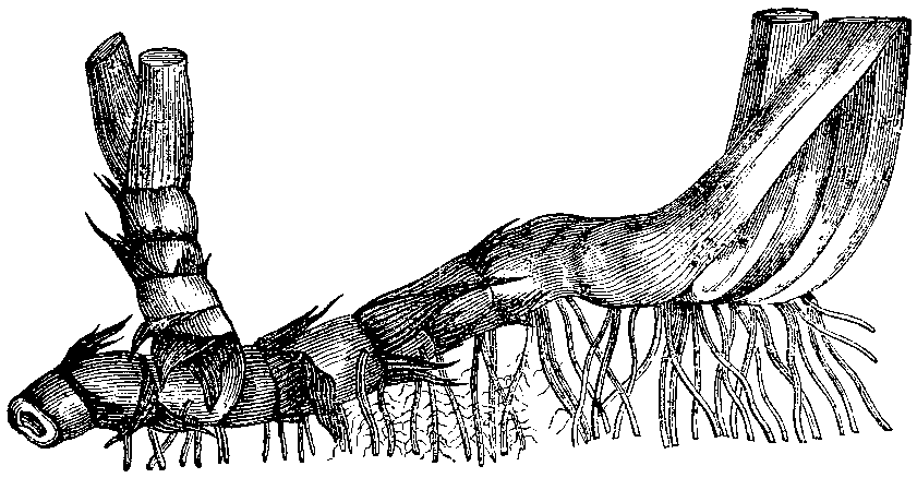 Slika 2: Korenika.